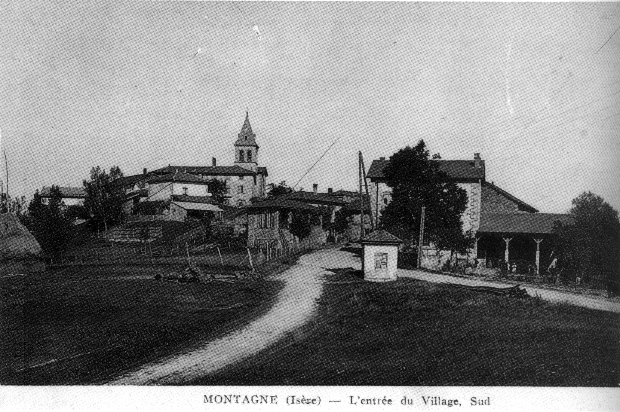 Montagne 38, l'entrée du village en 1920